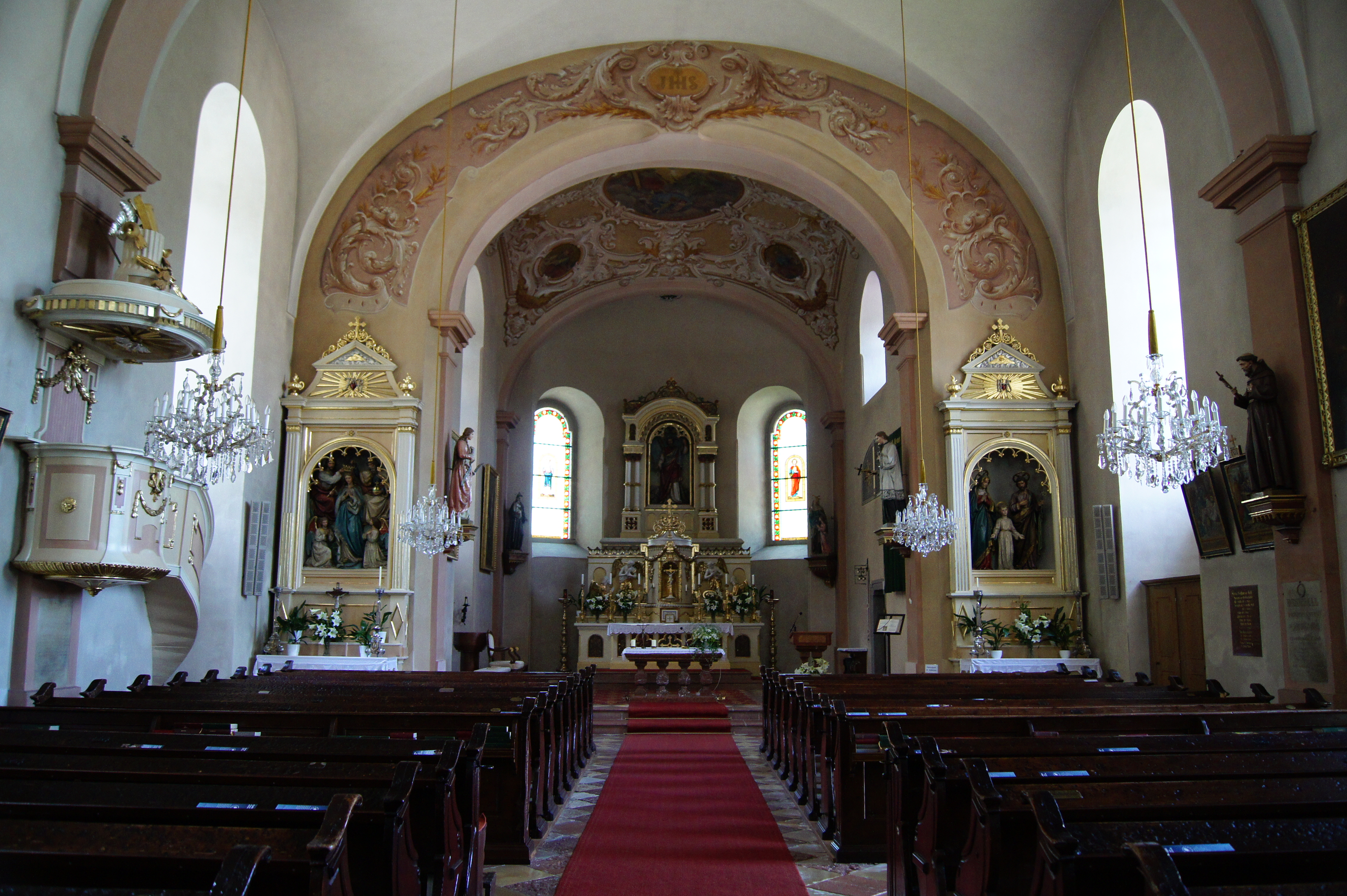 Kath. Pfarrkirche hl. Andreas - Innenraum